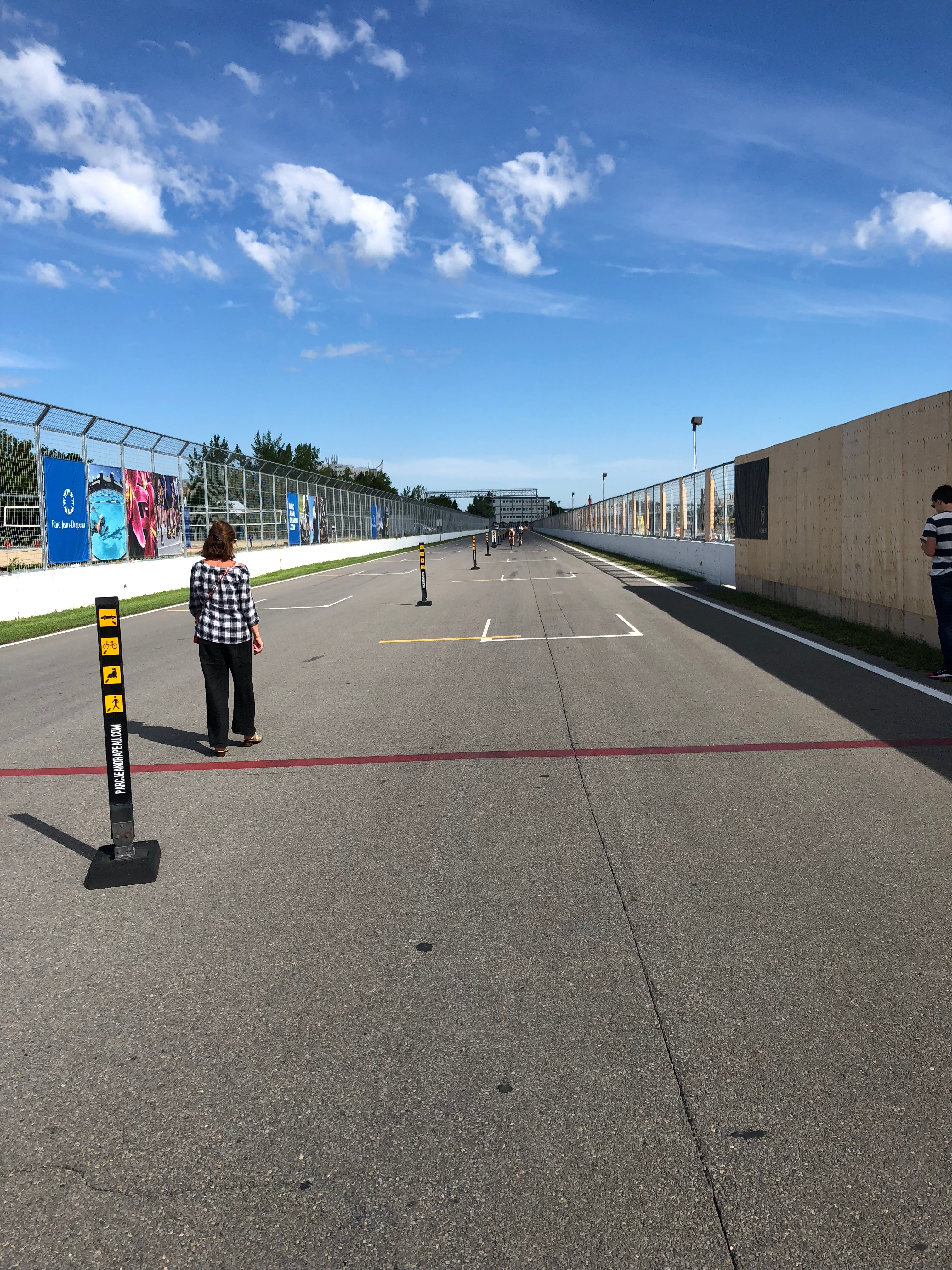 Le circuit Gilles Villeneuve, base de loisirs hors week-end de Grand Prix